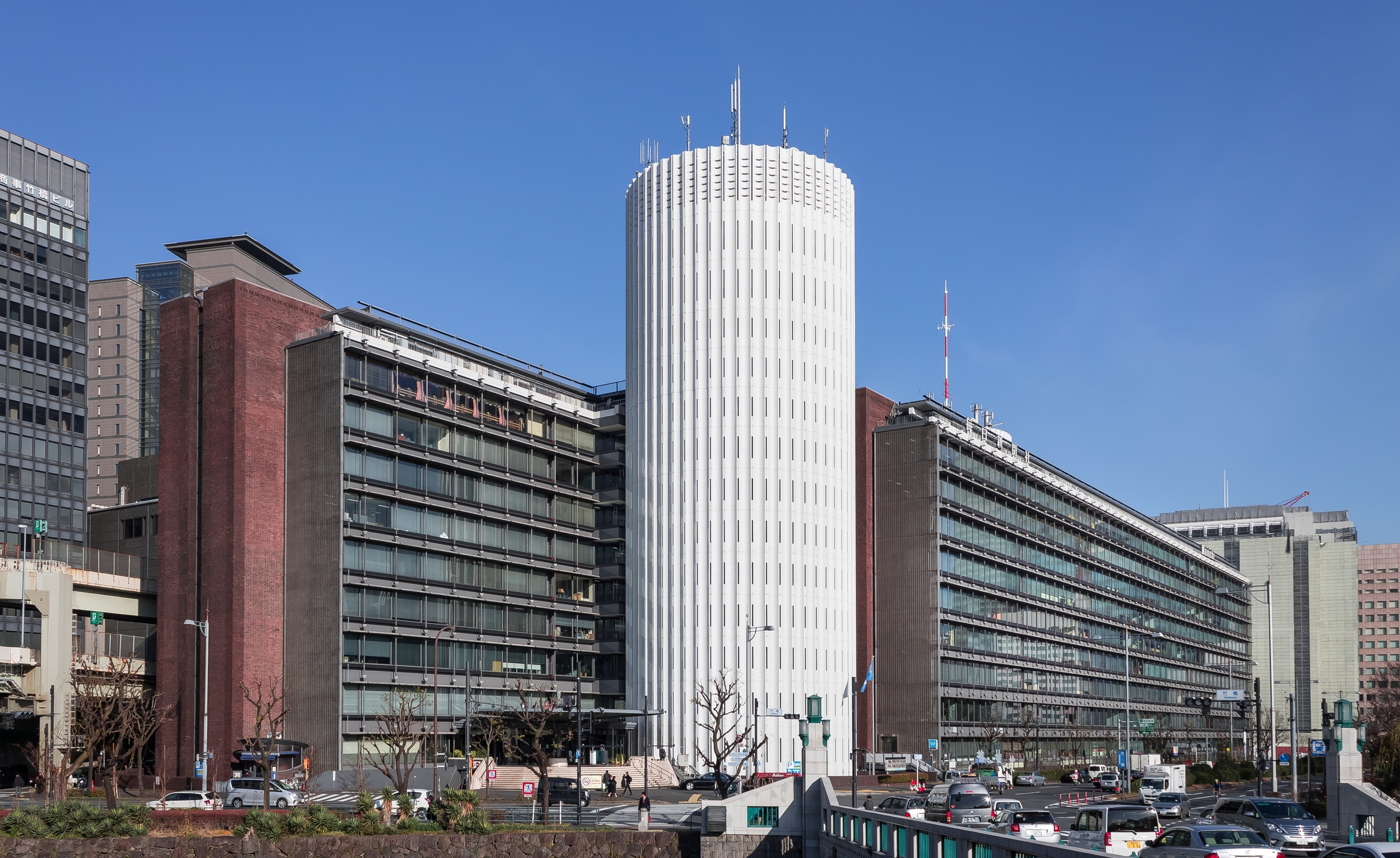 パレスサイド・ビルディング(毎日新聞東京本社)、林昌二（日建設計）1966。